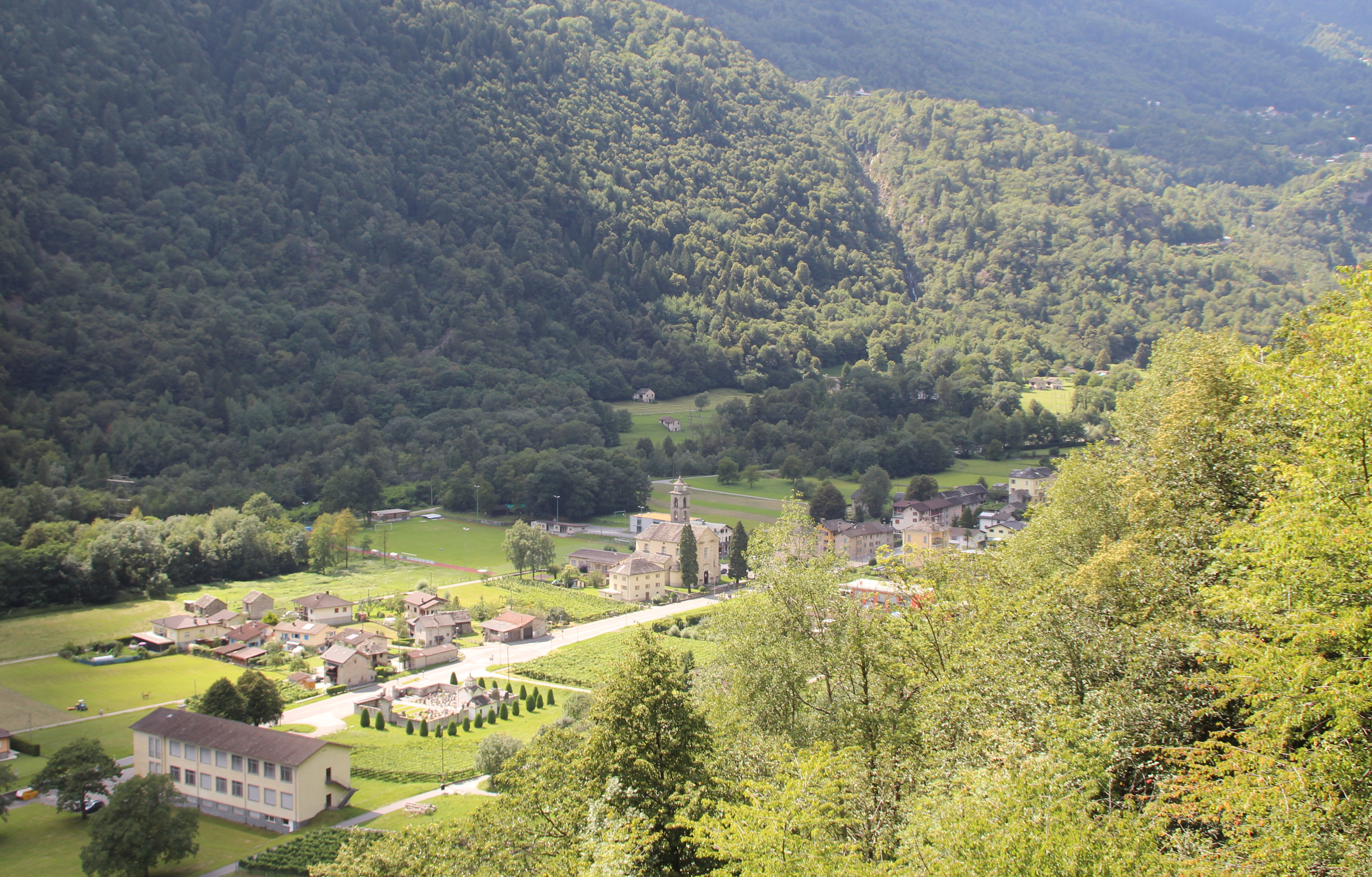 Dongio